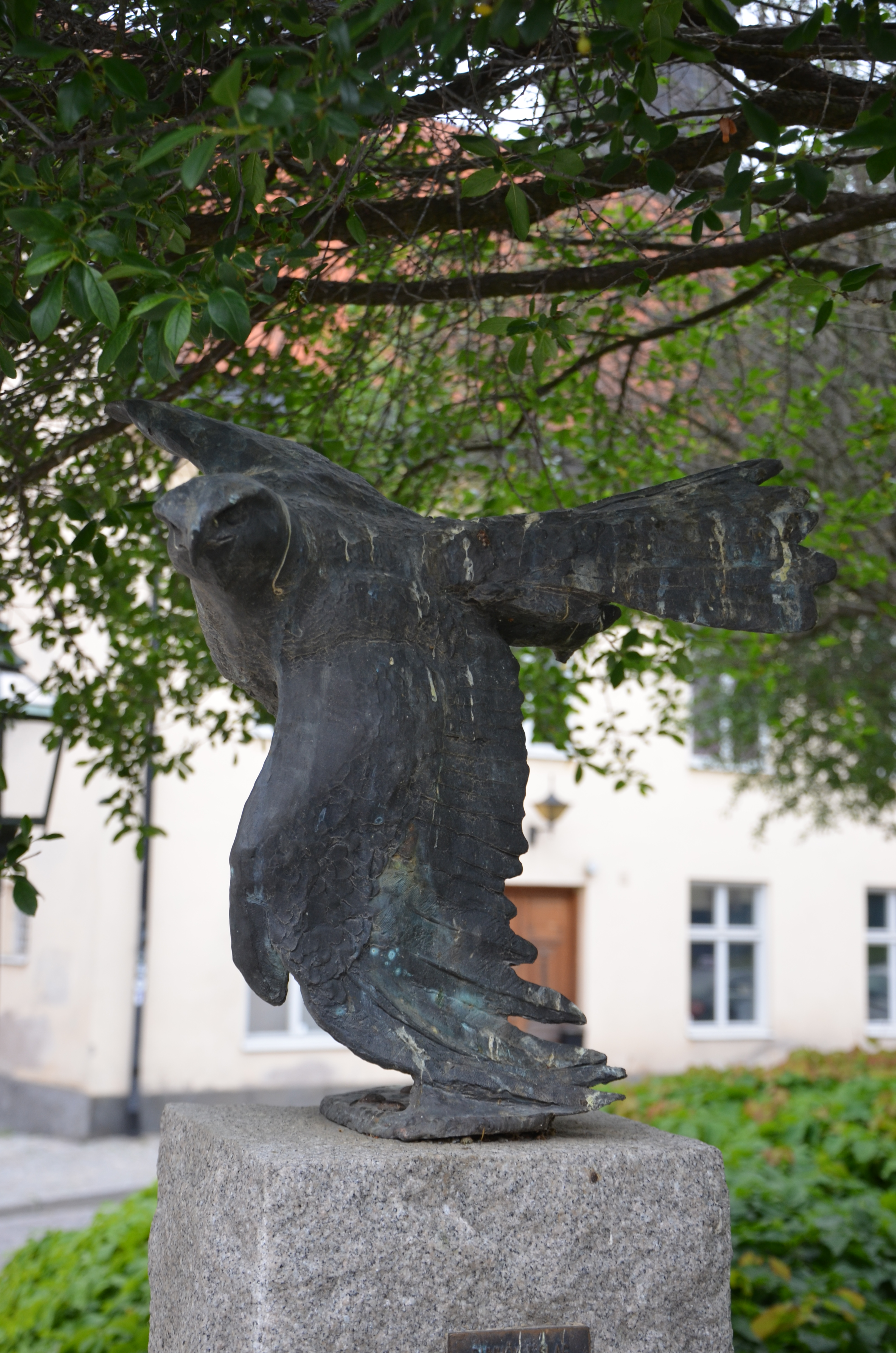 Torbjörn Forsbergs Duvhök i slag, brons, 1997, parktorgetr Kaplanen i Enköping